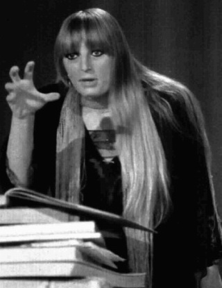 Italian singer Gabriella Ferri